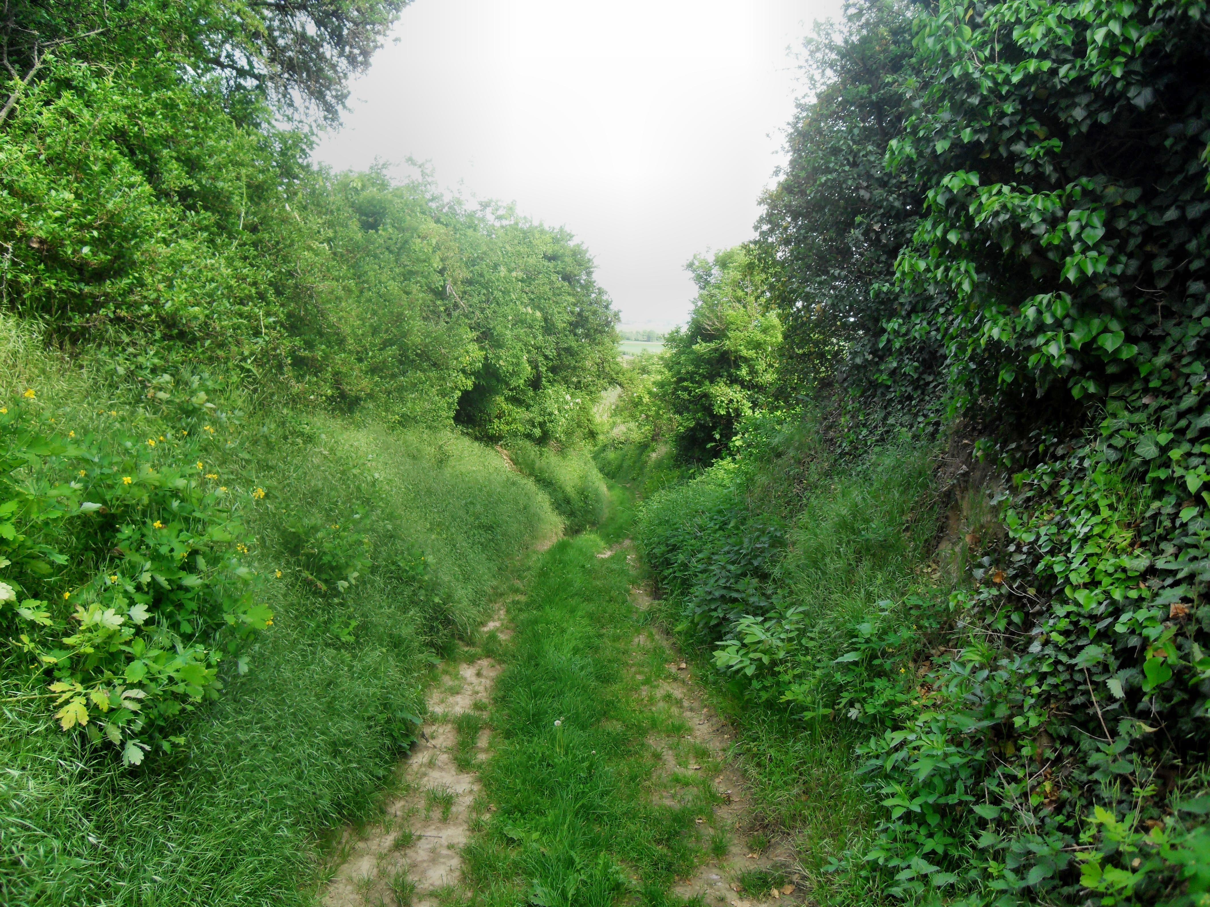 Ein Hohlweg zwischen Alsheim und Mettenheim in der Nähe von der rheinhessischen Ortsgemeinde Alsheim in Rheinland-Pfalz (Deutschland)